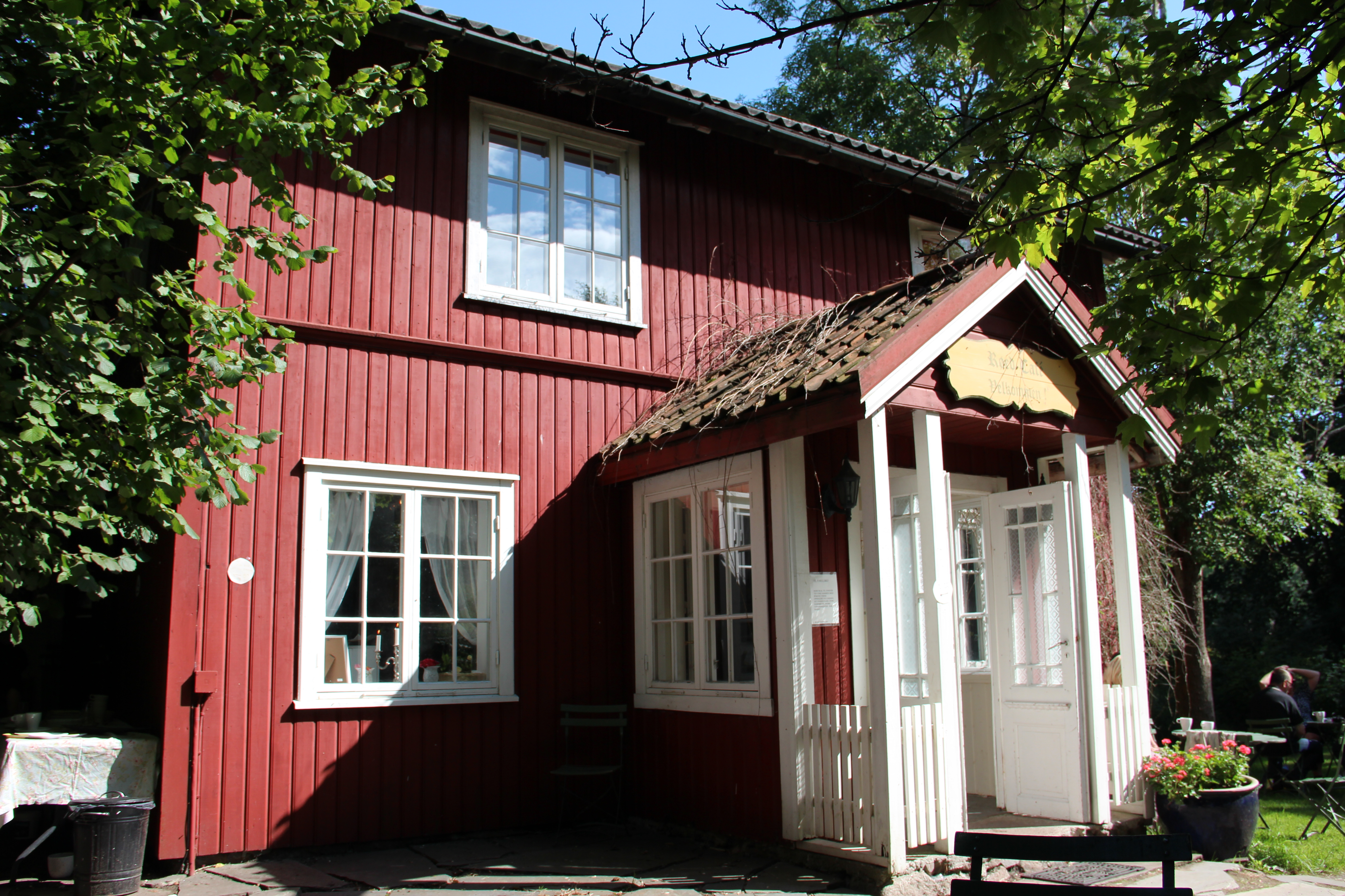 Cafeen